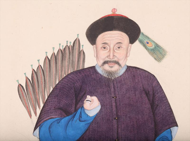 《御筆平定臺灣二十功臣像贊》中的蔡攀龍畫像，2014年由紐約iGavel拍賣行拍賣。